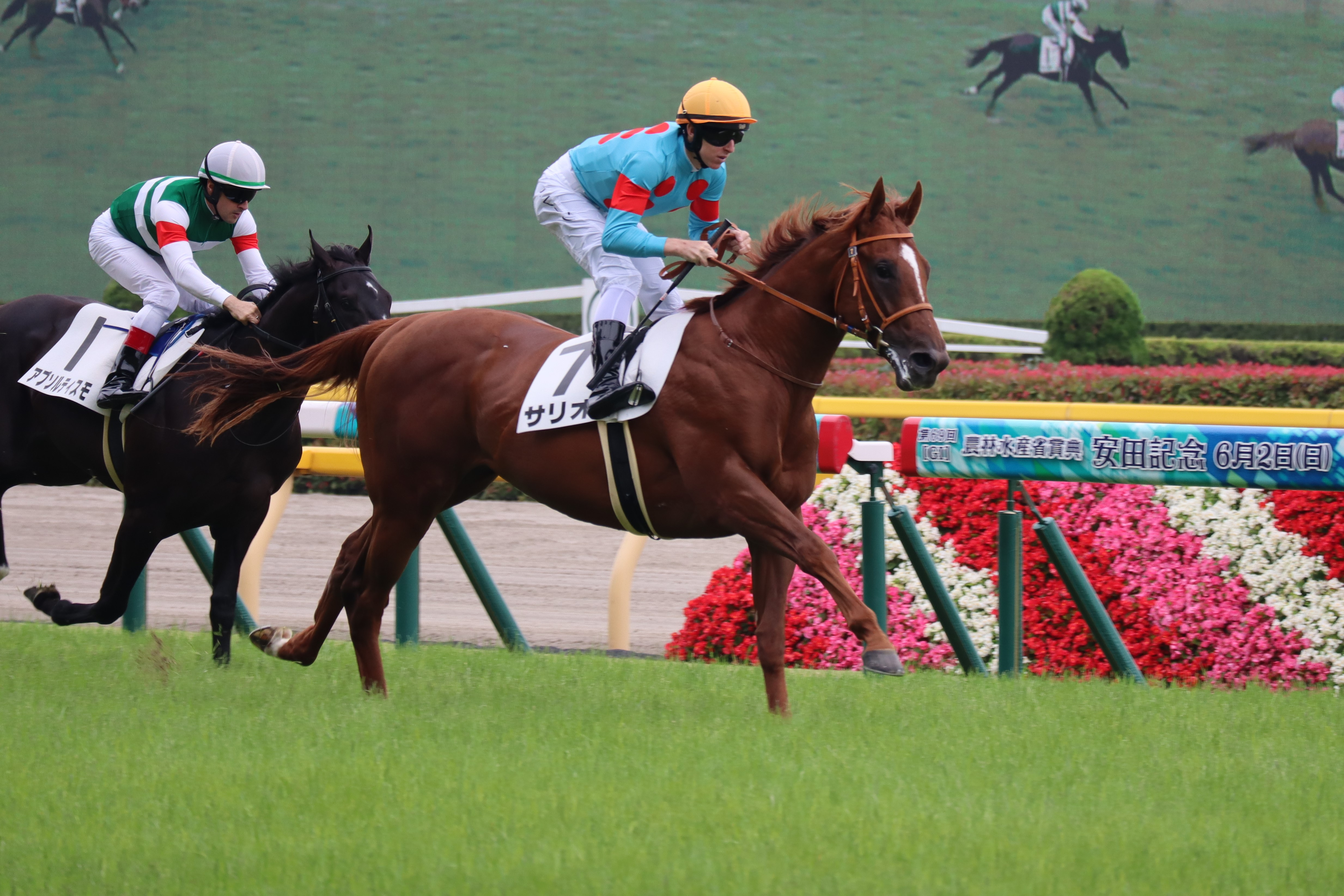 サリオス(新馬戦優勝時)